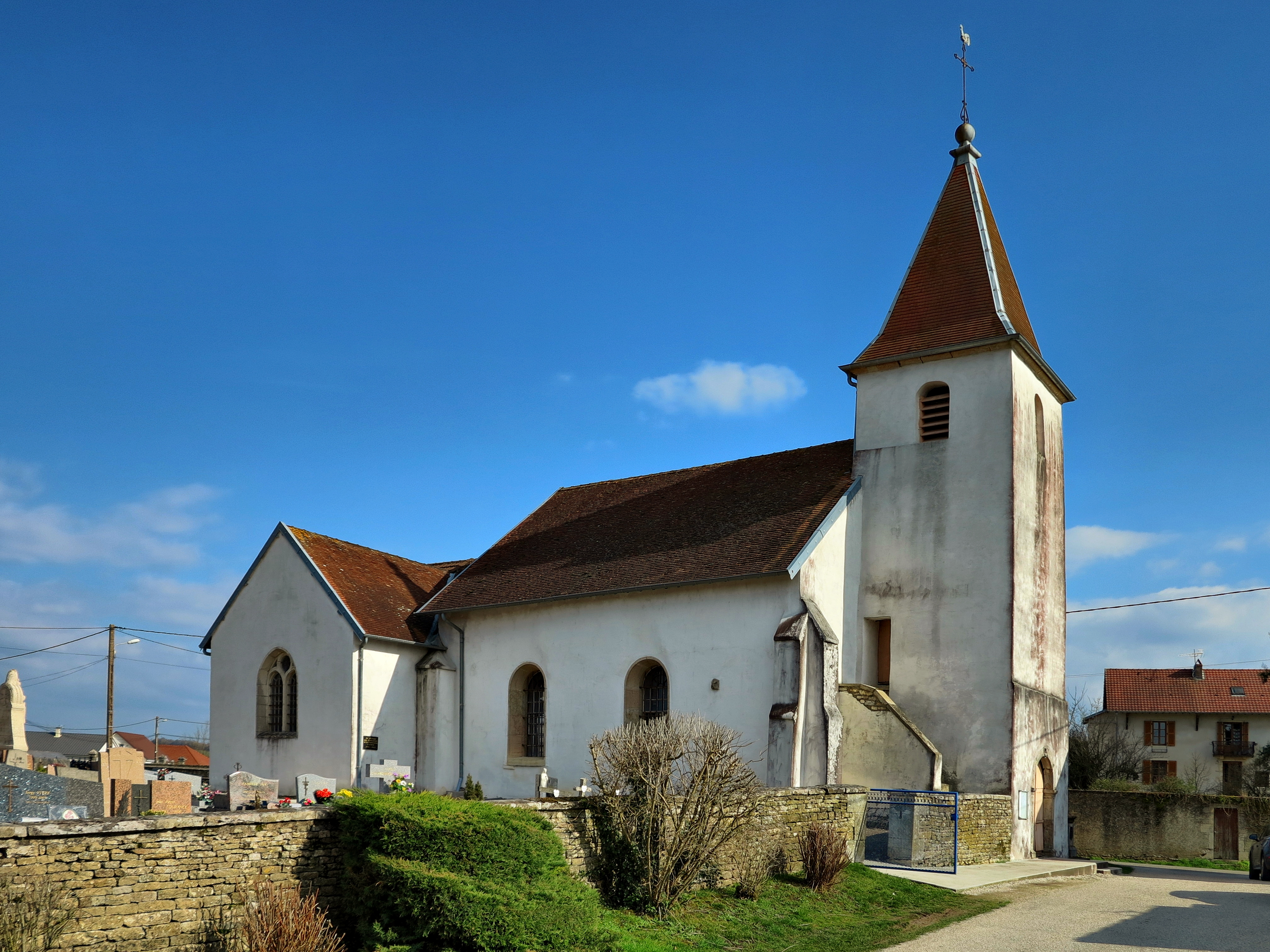 L'église